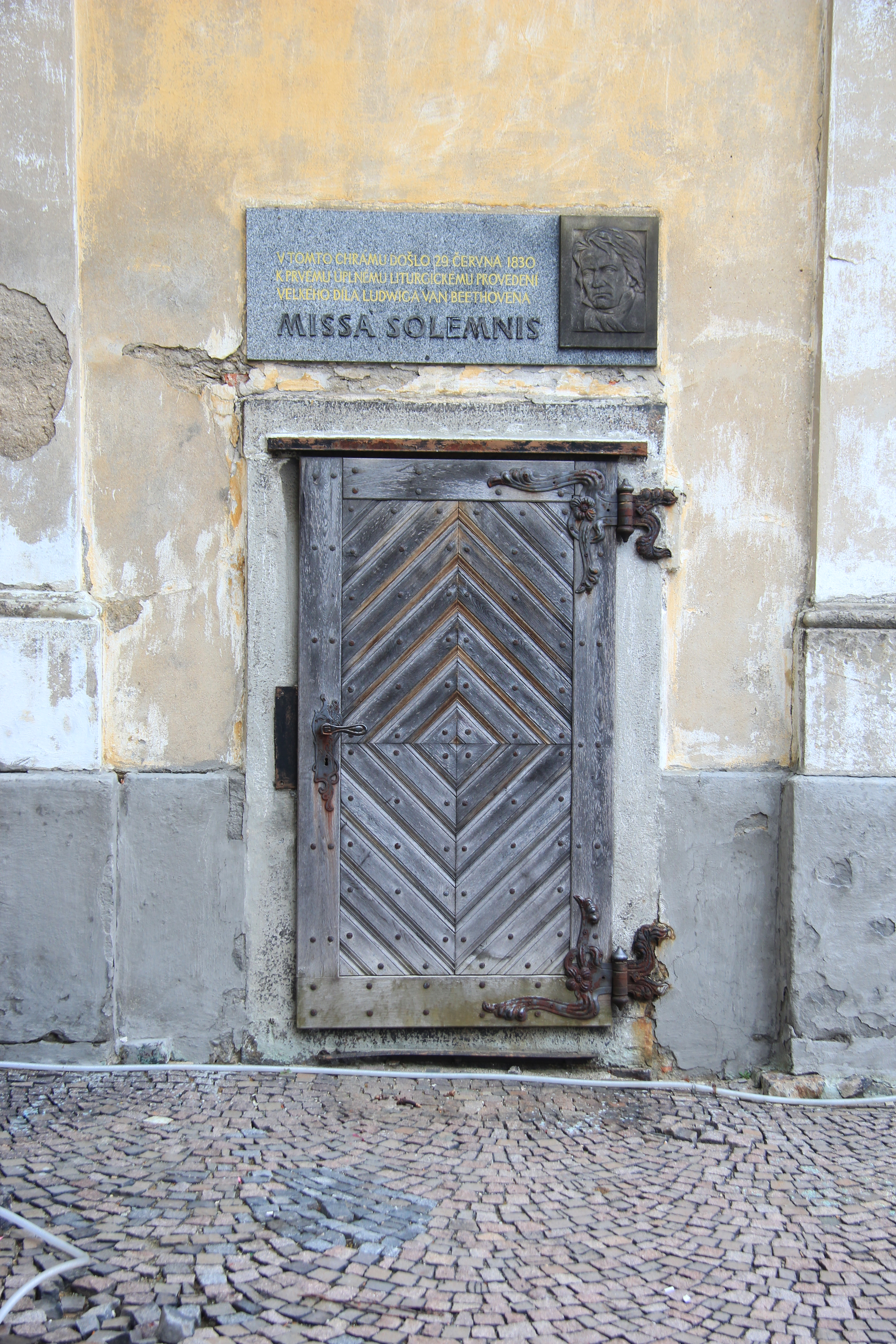 St. Peter und Paulkirche in Varnsdorf, Tschechien